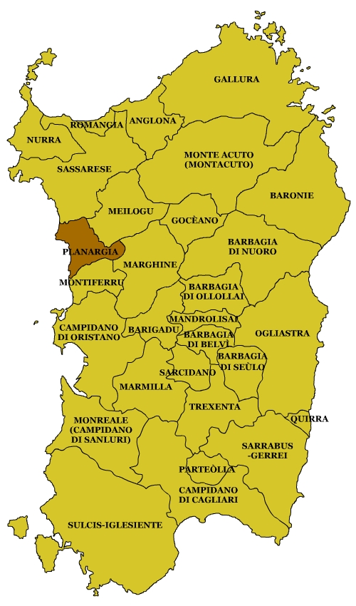 Sardinian Subregions